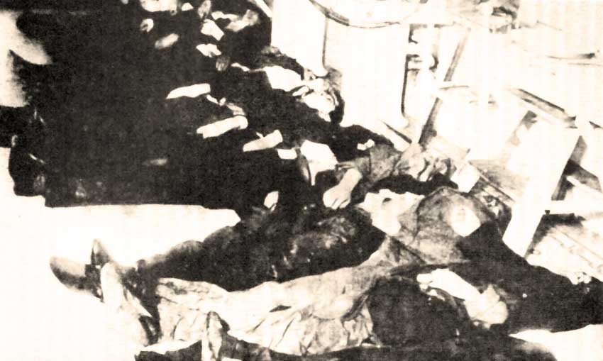 Cadáveres de los jóvenes nacistas asesinados en la Masacre del Seguro Obrero, ocurrida en Santiago de Chile el 5 de septiembre de 1938.